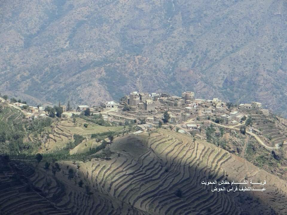 قرية إنشام إحدى قرى عزلة بني أحمد بمديرية حفاش في محافظة المحويت التابعة لاقليم تهامة بالجمهورية اليمنية